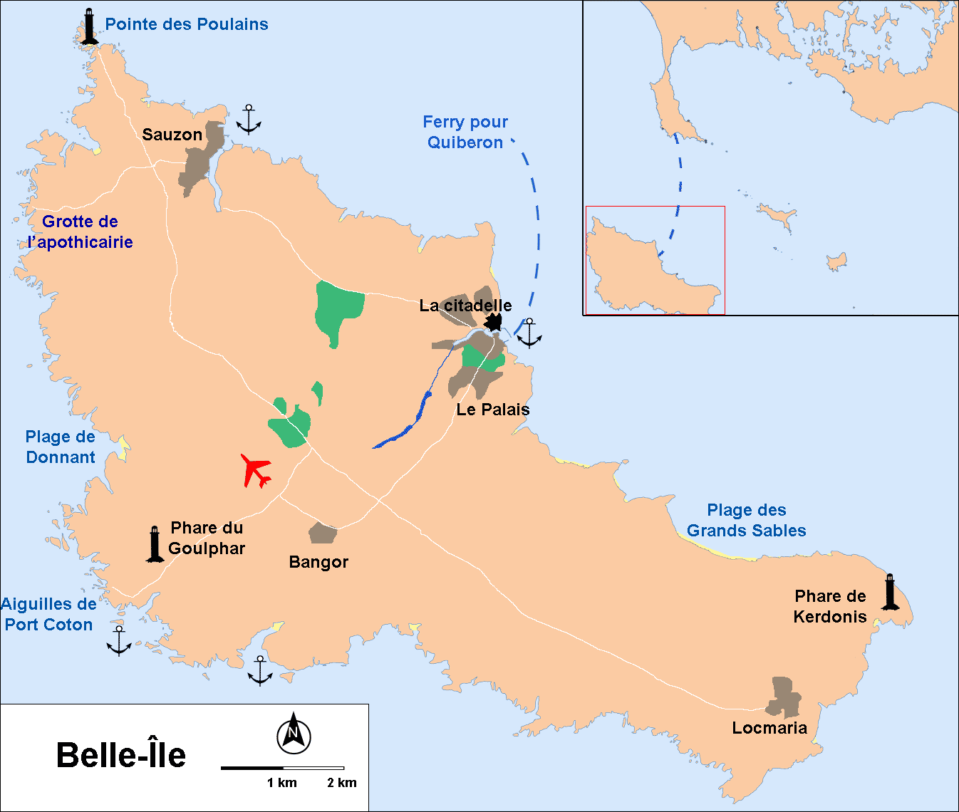 Descroption : carte Belle Ile Place : Belle Ile, Bretagne, France Date : Juin 2006 Auteur : Pline Réalisation Personnelle